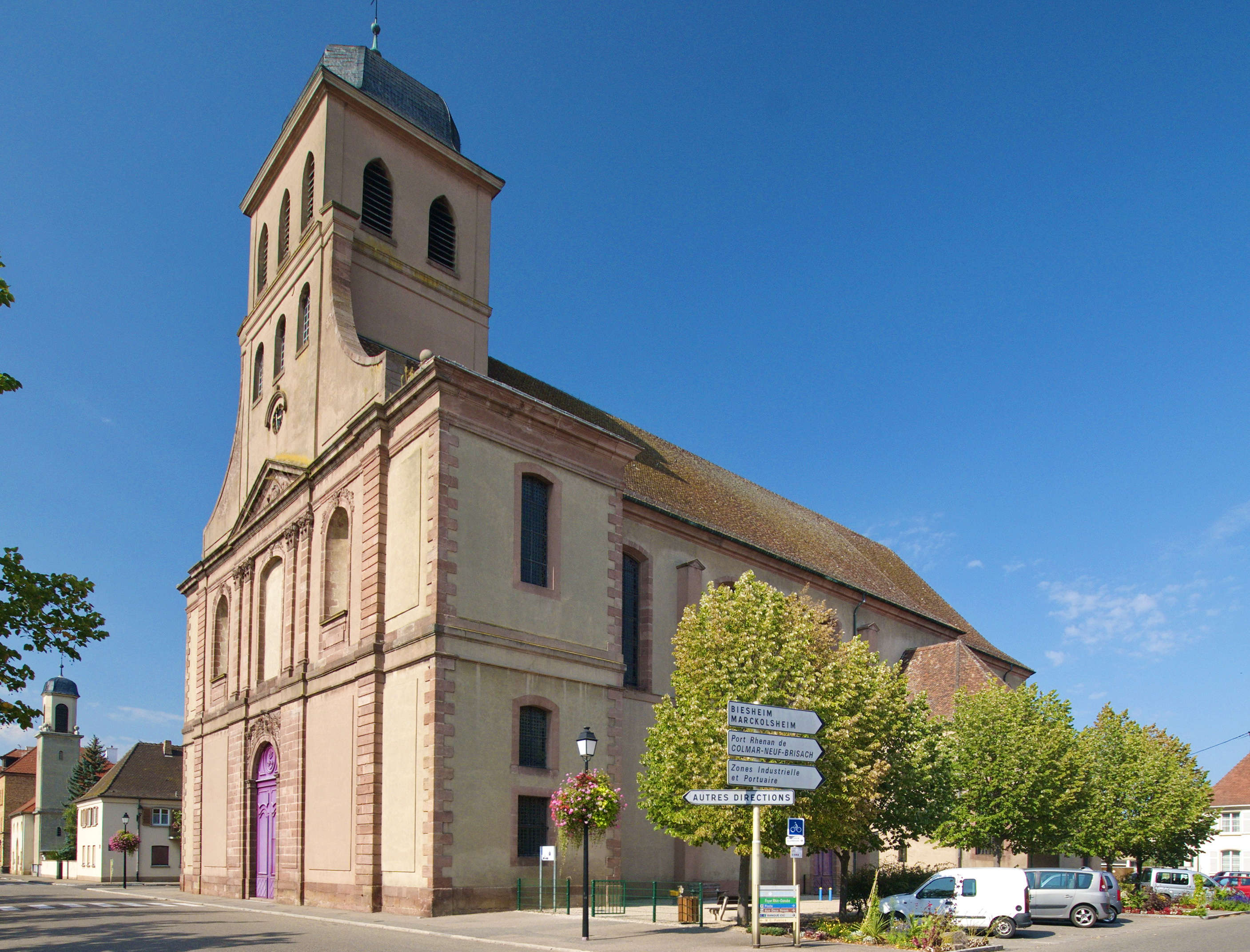 Église Saint-Louis de Neuf-Brisach, 26 place d'Armes (Classé, 1939) .